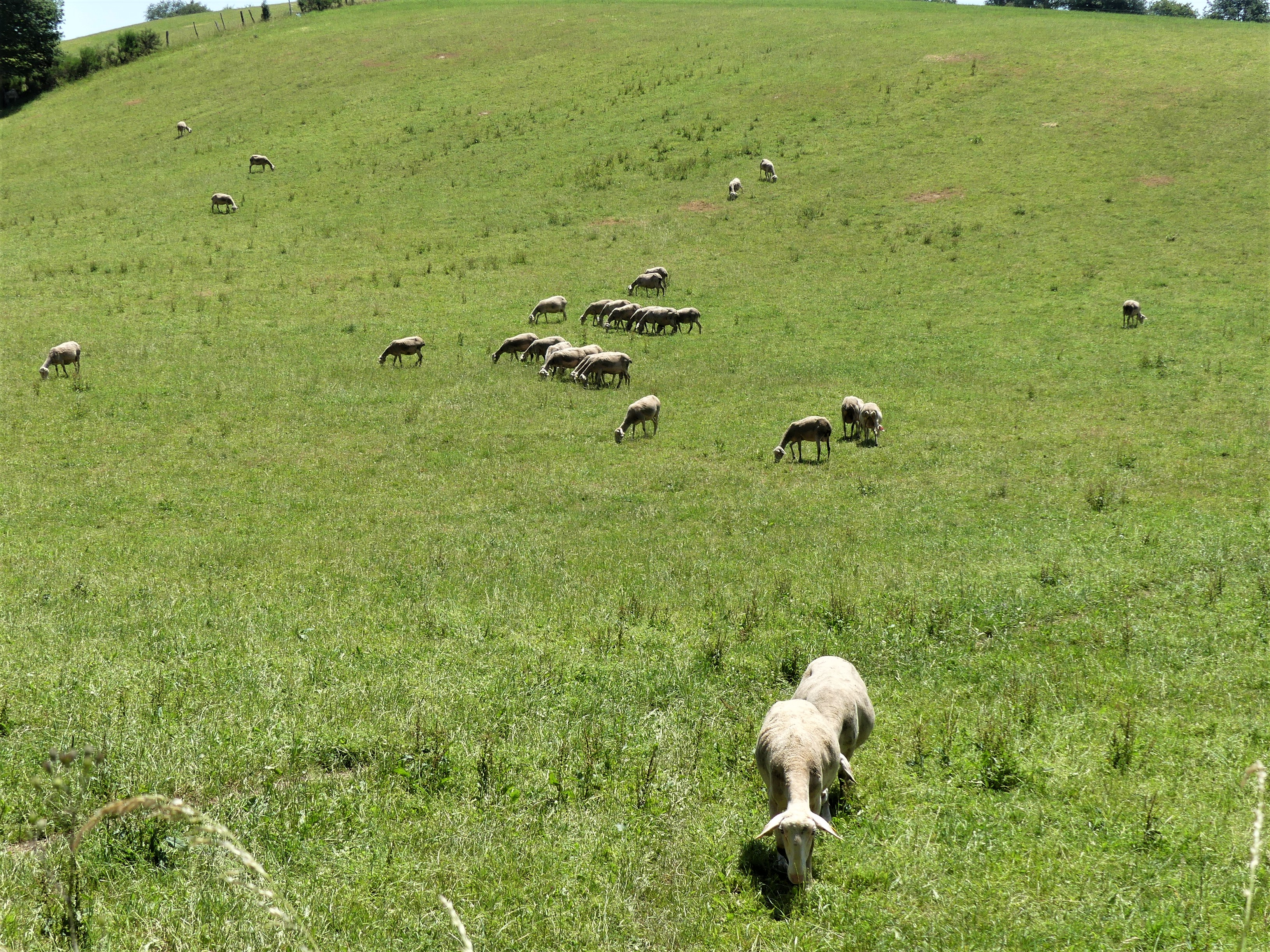 Brebis dans un champ près de la Plane, Arvieu, Aveyron, France.